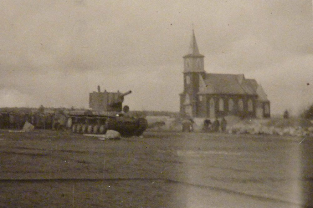 Беларуская (тарашкевіца): Бакшты (Bakšty). Касьцёл Сьвятога Губэрта